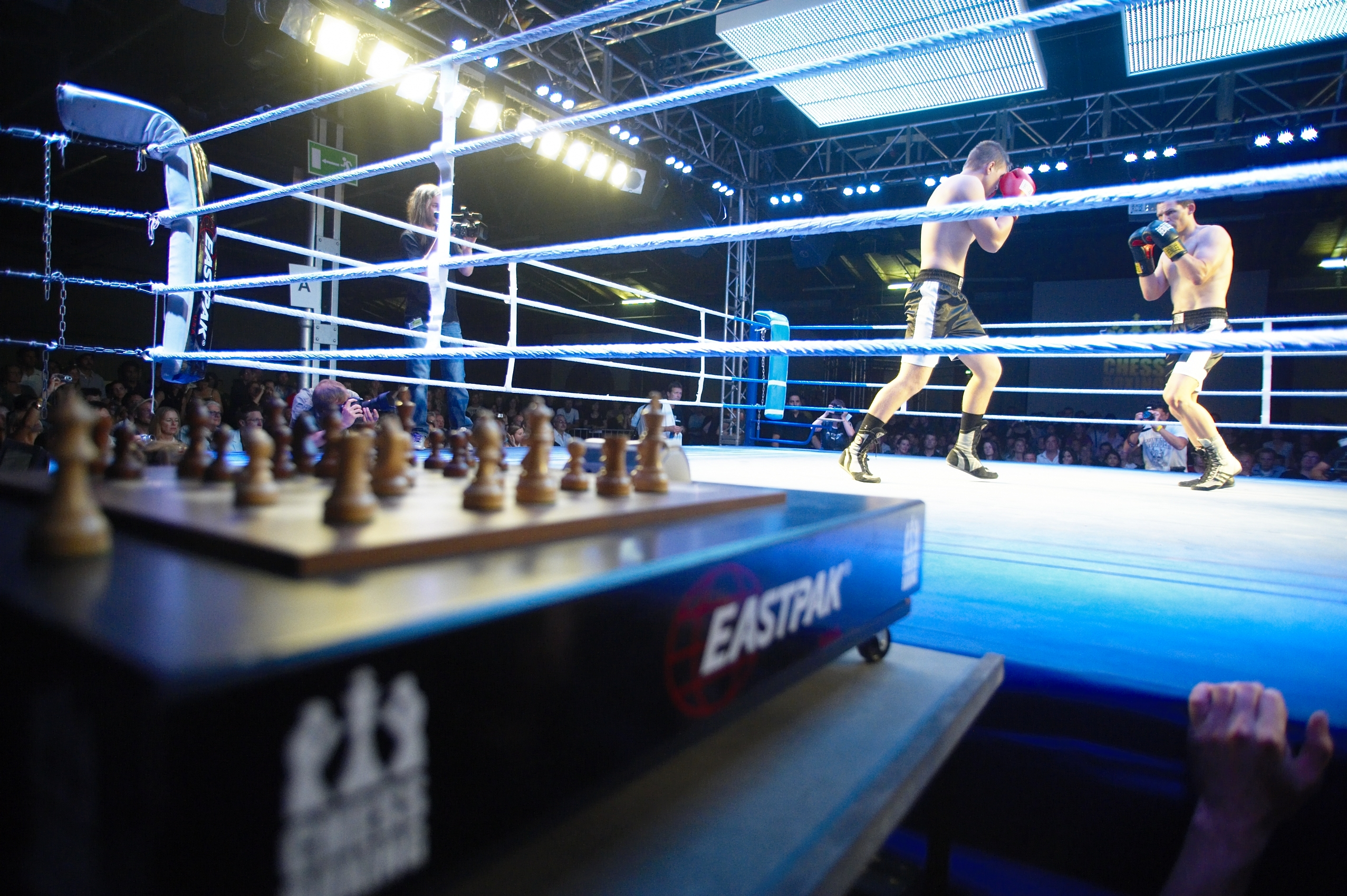 Das Bild zeigt die Sportart Schachboxen. Abgebildete Personen sind auführende Athleten bei einem der Öffentlichkeit zugänglichen Event am 5.7.2008. Alleiniger Urheber ist die WCBO (World Chess Boxing Organisation).